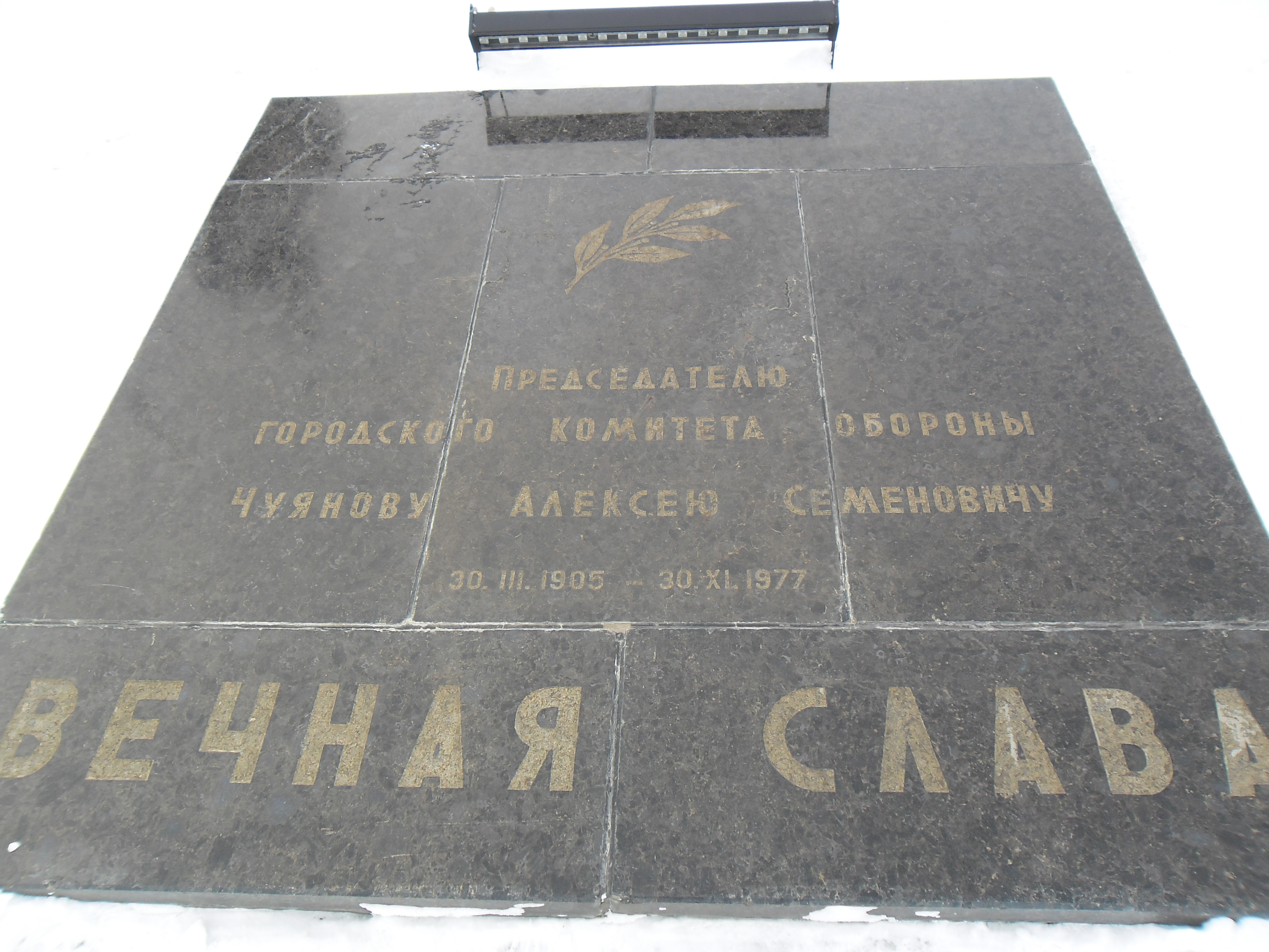 Фото надгробной плиты председателя городского комитета обороны, Чуянова Алексея Семёновича на Мамаевом Кургане в Волгограде.